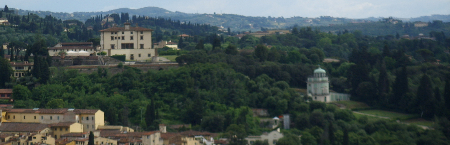 Forte belvedere e kafeehaus